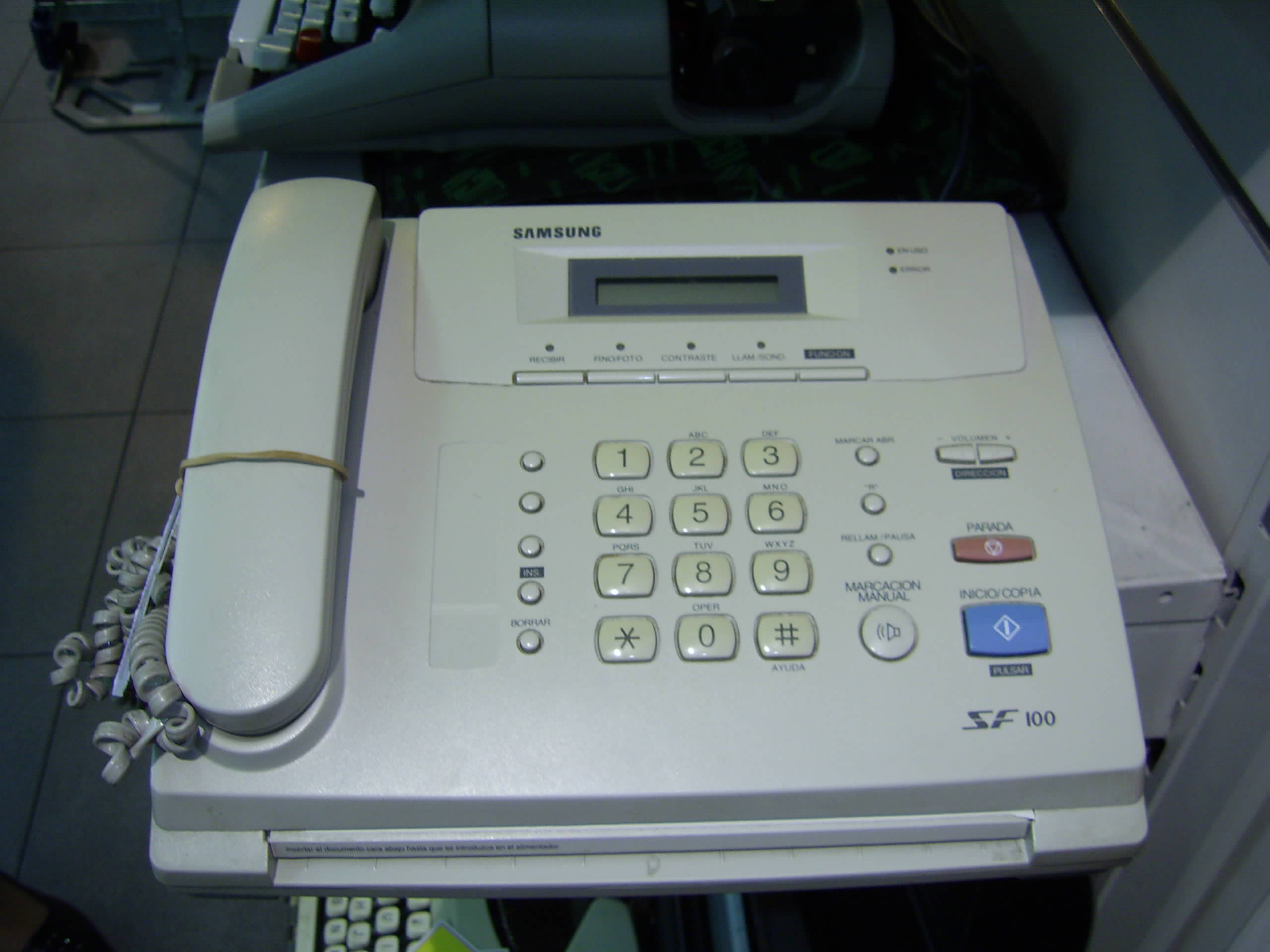 Fax térmico Samsun SF 100